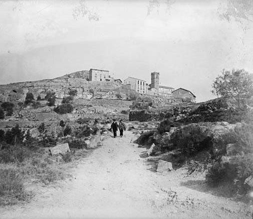 Imatge